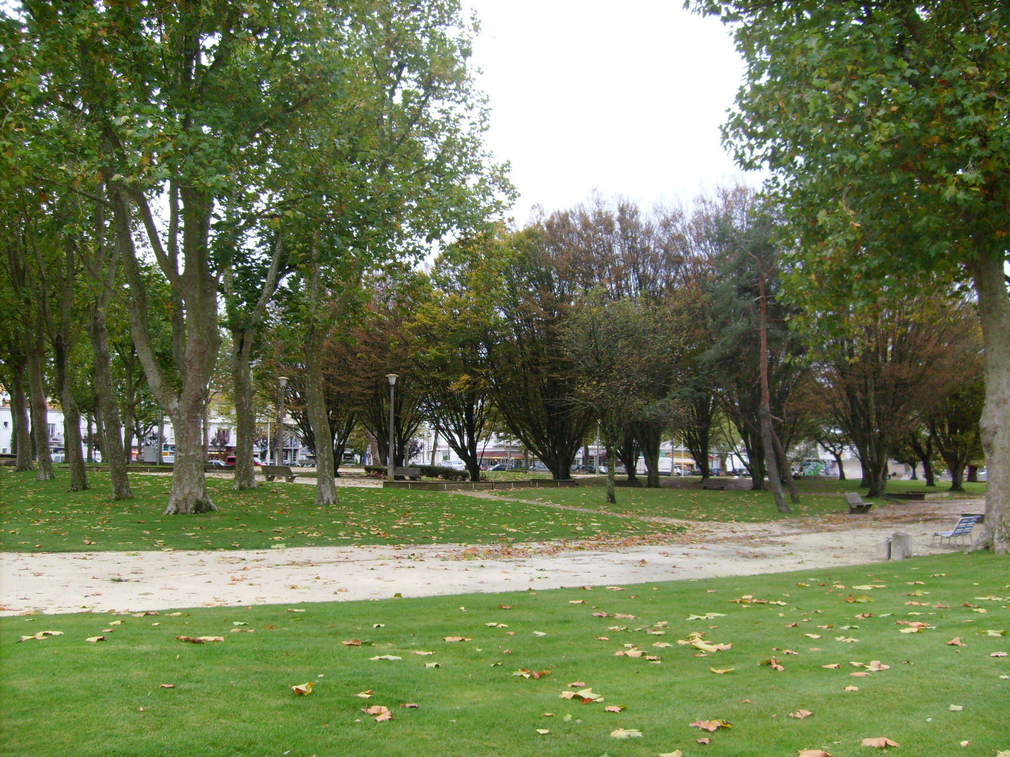 Parc de la tâche verte, Royan